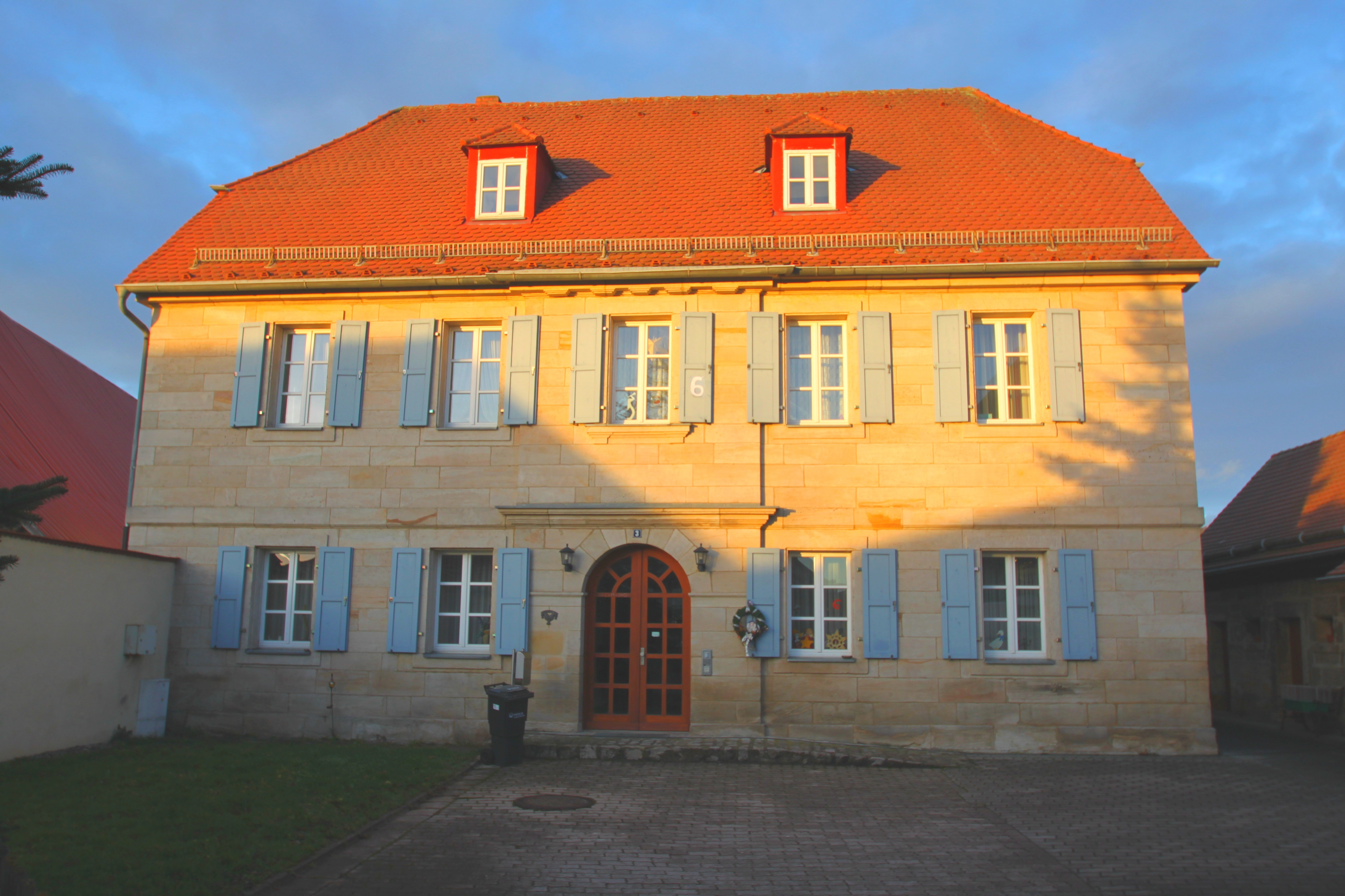 Schulhaus und Kantorat, Kirchplatz 3, Bindlach, Baudenkmal D-4-72-119-10